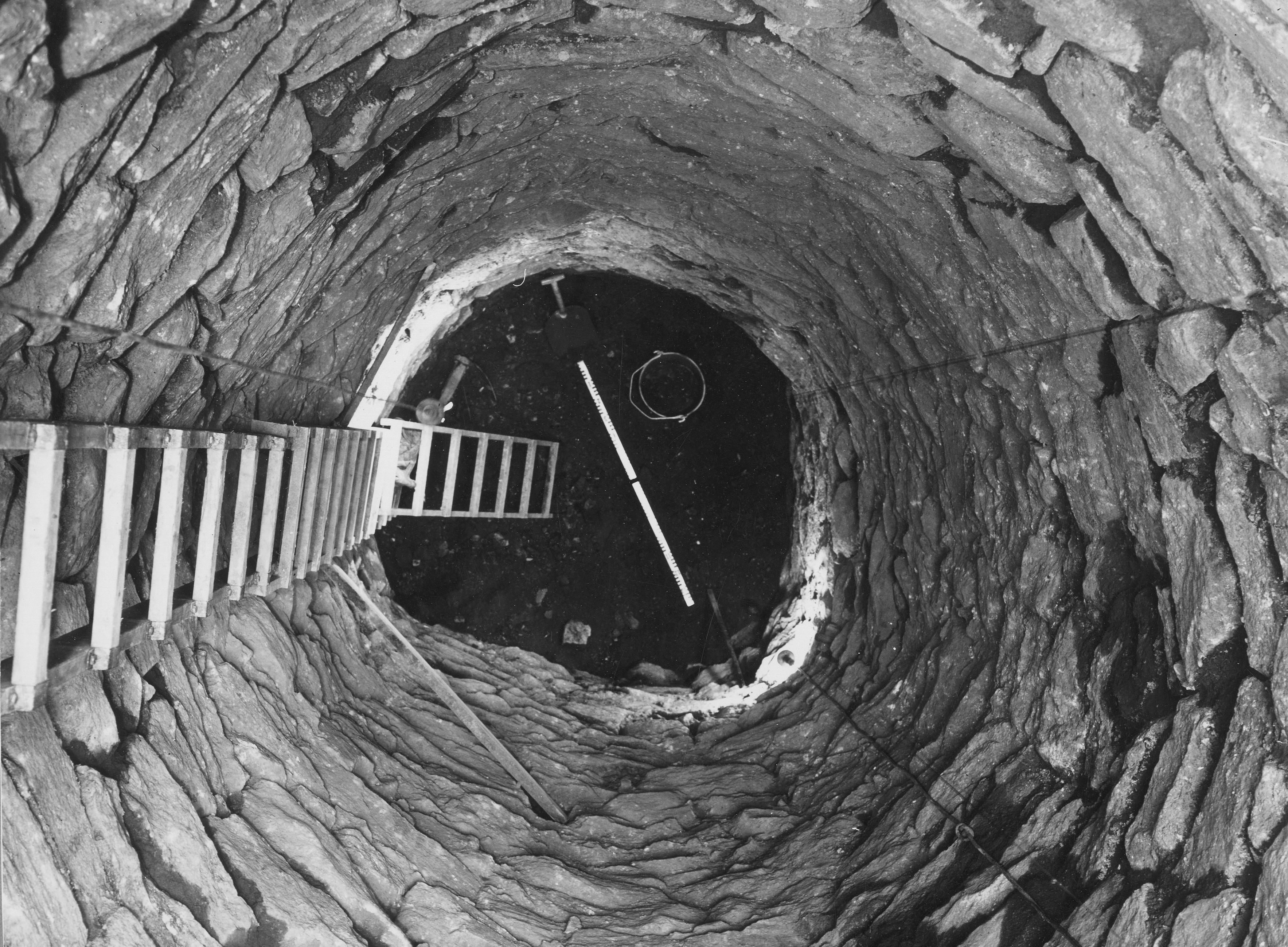 Bild för fotogrammetrisk uppmätning av brunnen i Pygmalion 4